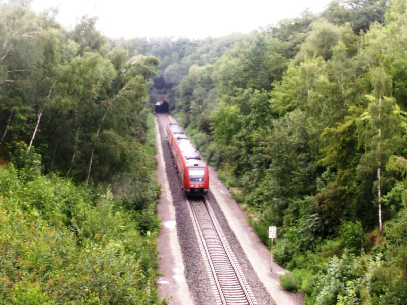 RE bei Ronneburg